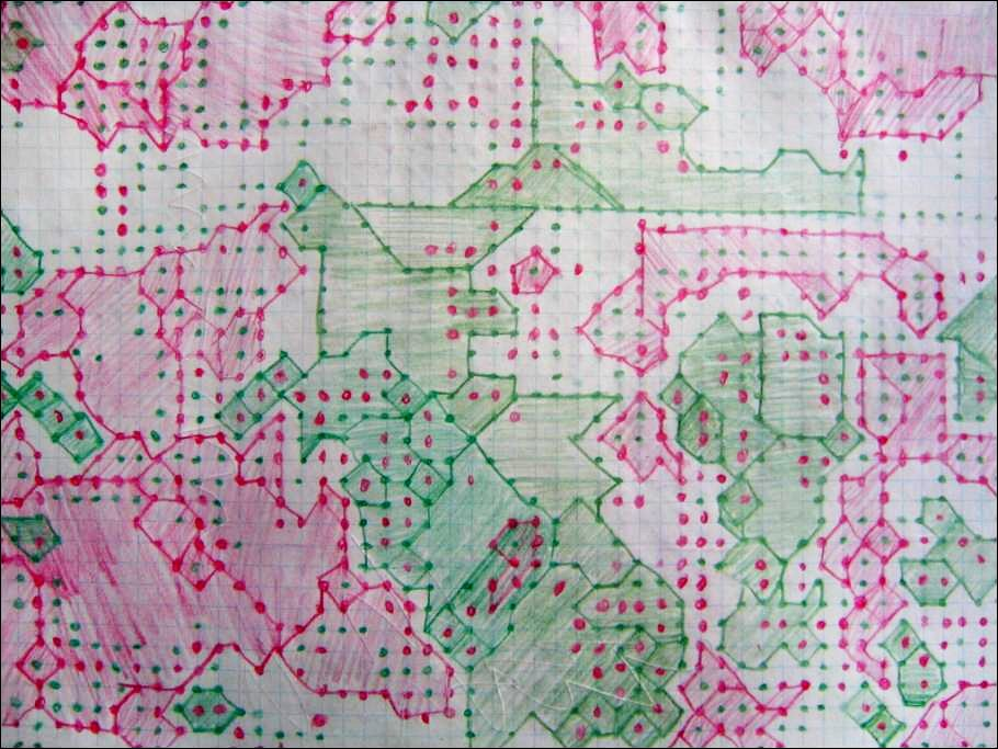 Fotografie partie ve hře Židi.